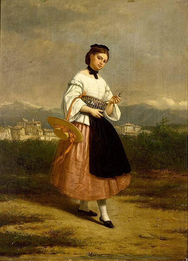 Girl in an Italian dress, oil on panel, 54 x 38 cm